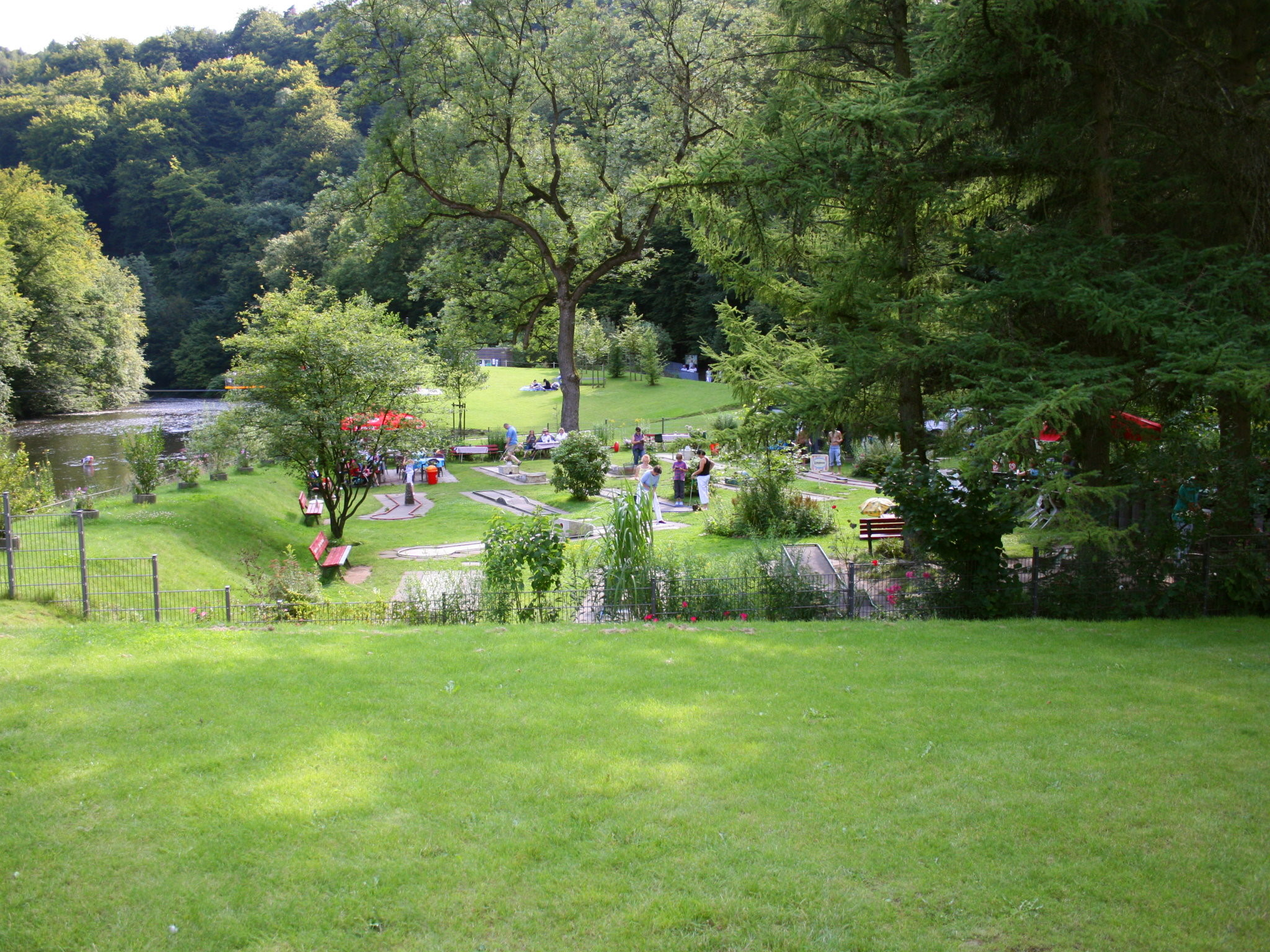 Brückenpark in Müngsten (Solingen/Remscheid), unterhalb der Müngstener Brücke